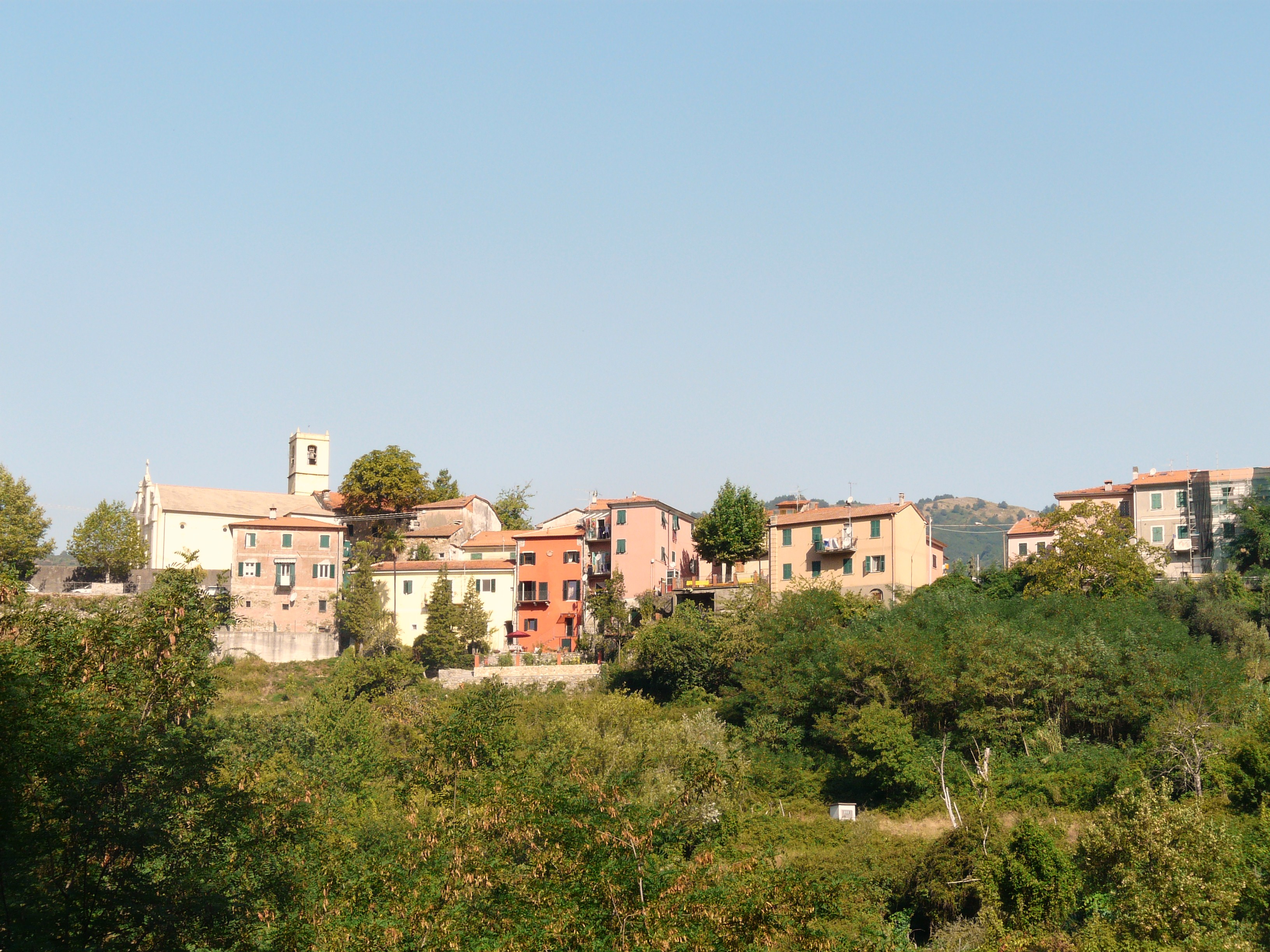 Panorama di Calice al Cornoviglio, Liguria, Italia